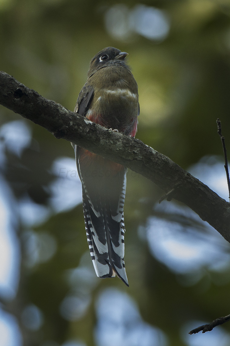 Female Mountain Trogon (Trogon mexicanus) in Sinaloa, México